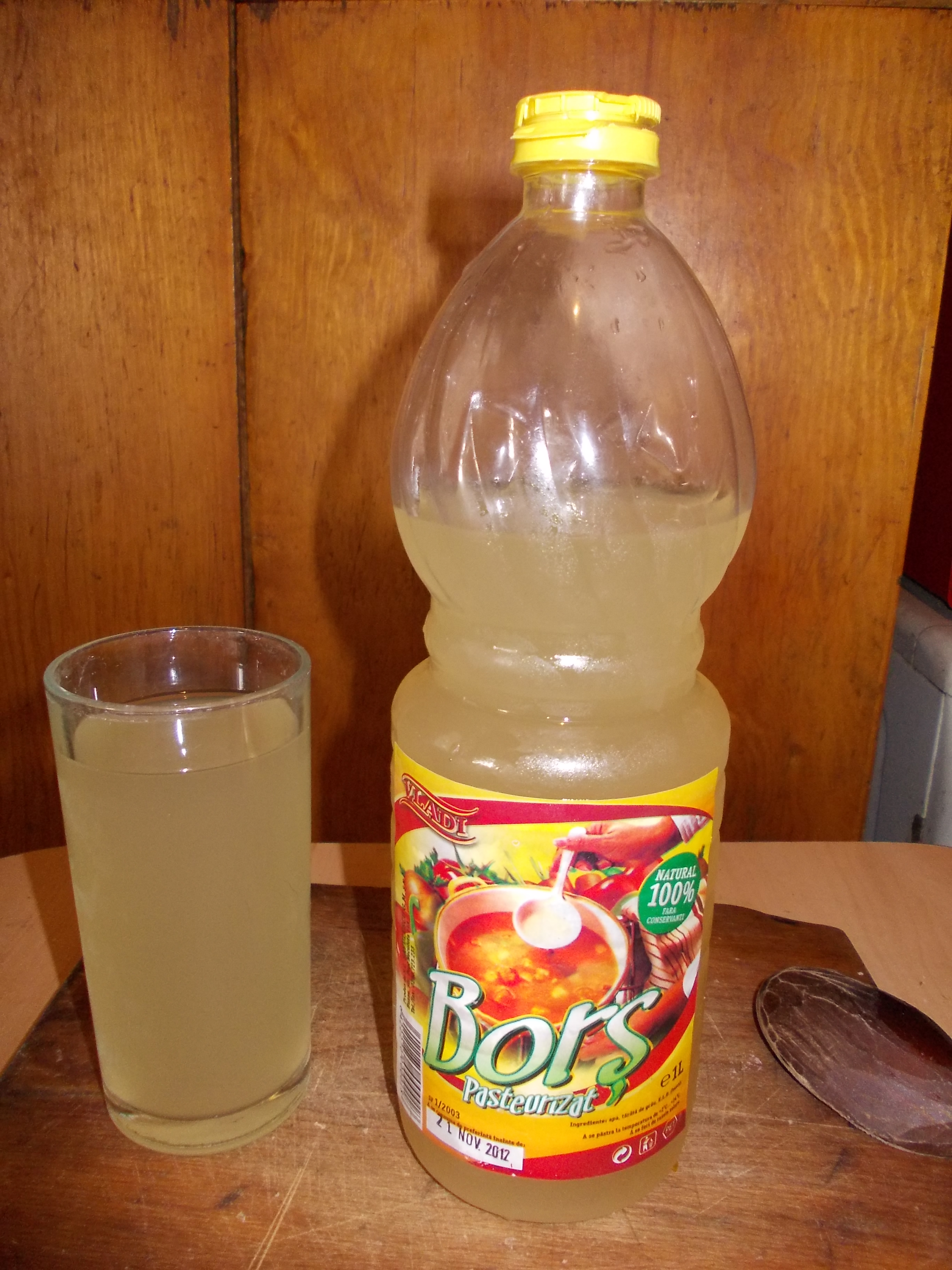 Borş de putină ambalatRomână: Borsch (borş), zumo agrio, originario de Rumania, preparado de salvadoTemplate:Румынский пастеризованный квас